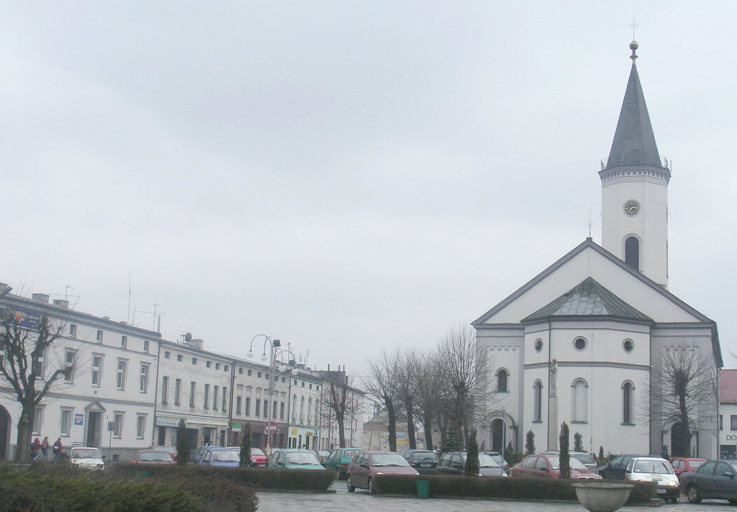 Dobrodzień, März 2006